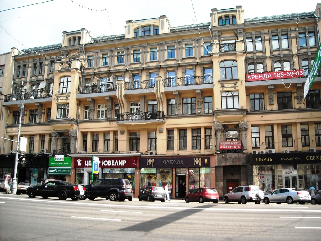 Москва, Тверская, 12